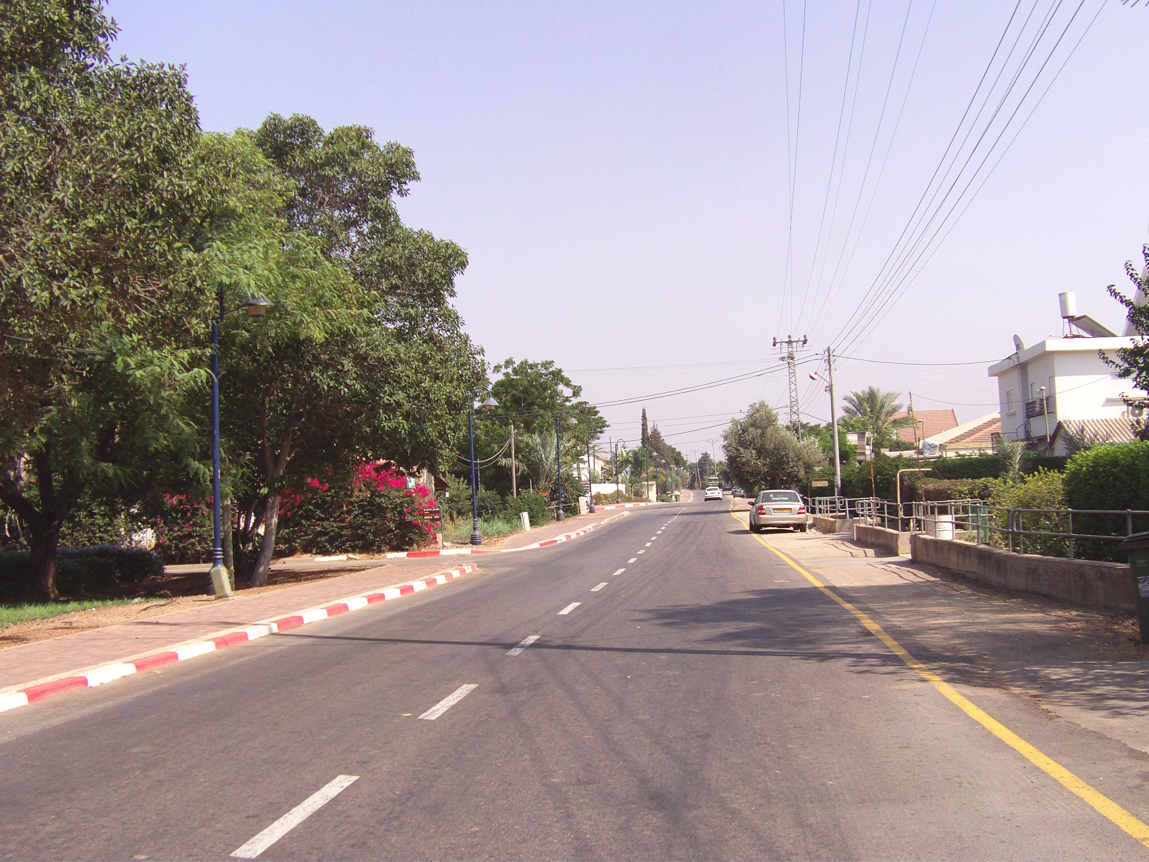 מושב ינון רחוב במושב